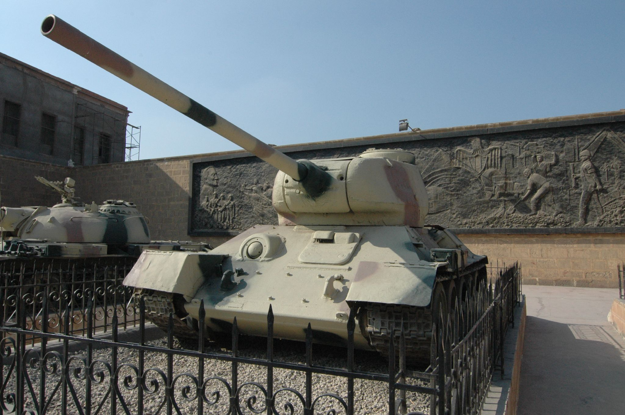 Cairo: museo militare